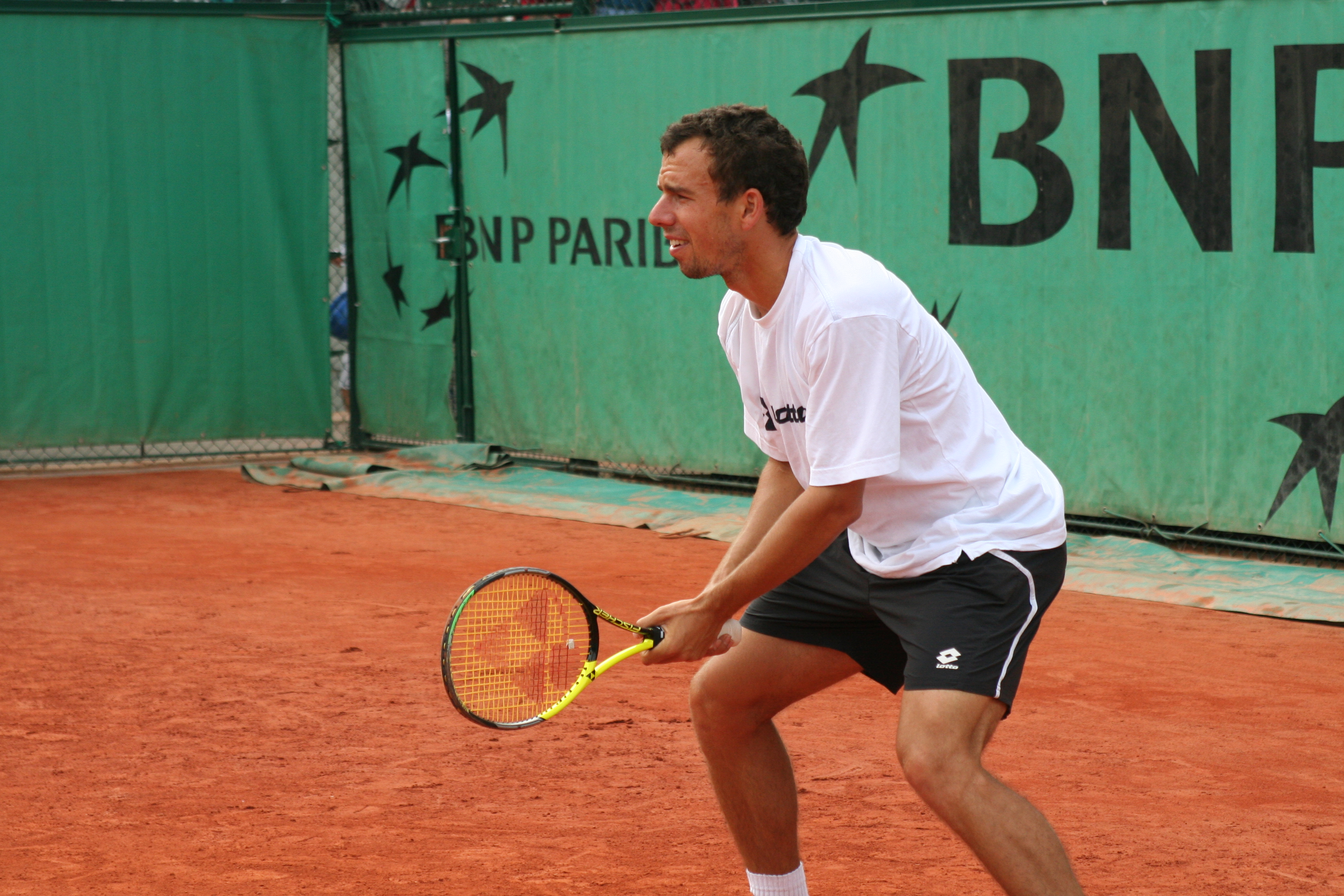 Le slovaque Hrbaty à l'échauffement. Photo personnelle prise lors de Roland Garros 2006.